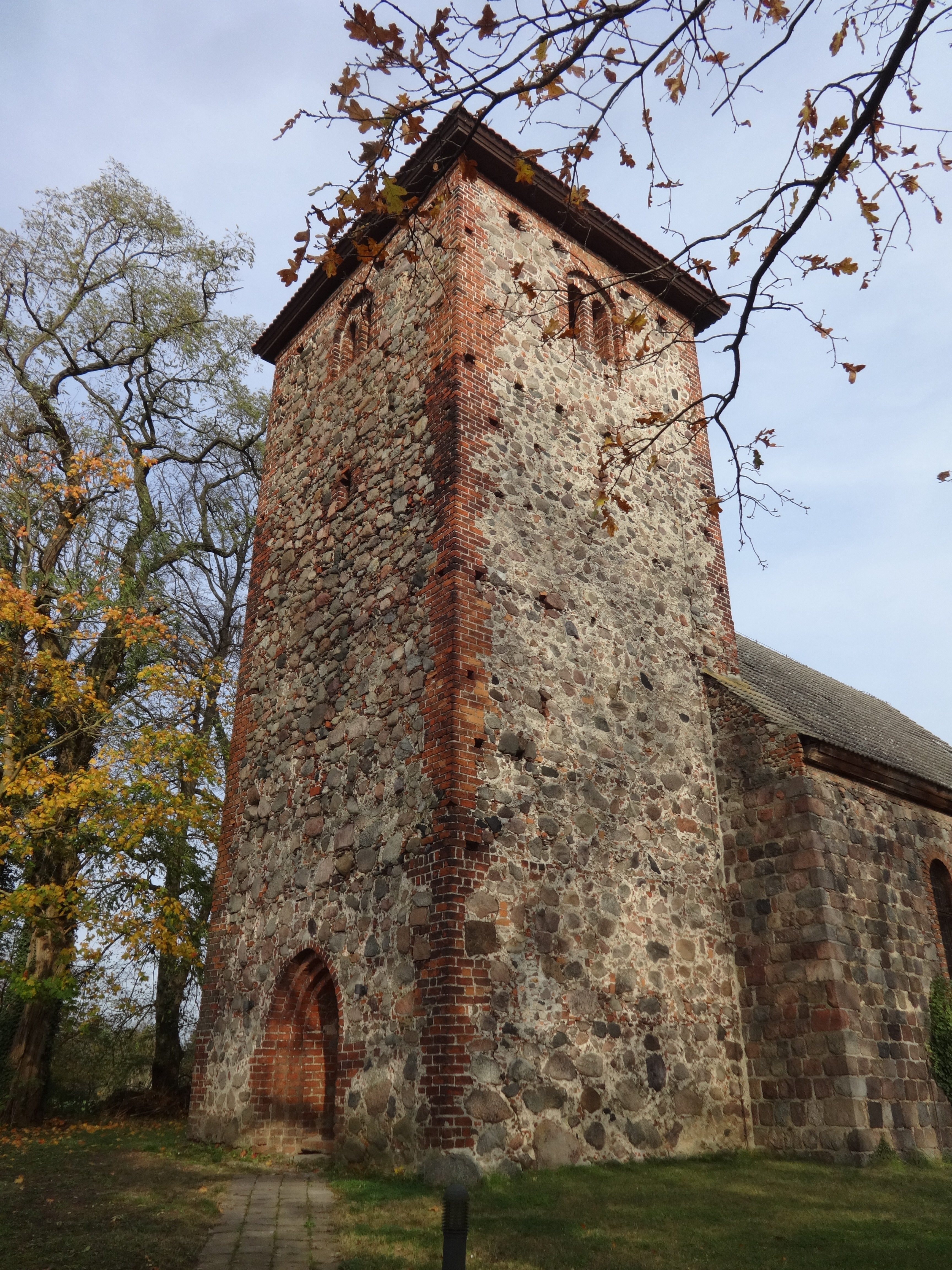 Die Dorfkirche in Hermersdorf, Stadt Müncheberg, ist eine Feldsteinkirche aus dem Ende des 13. Jahrhunderts im Landkreis Märkisch-Oderland in Brandenburg.